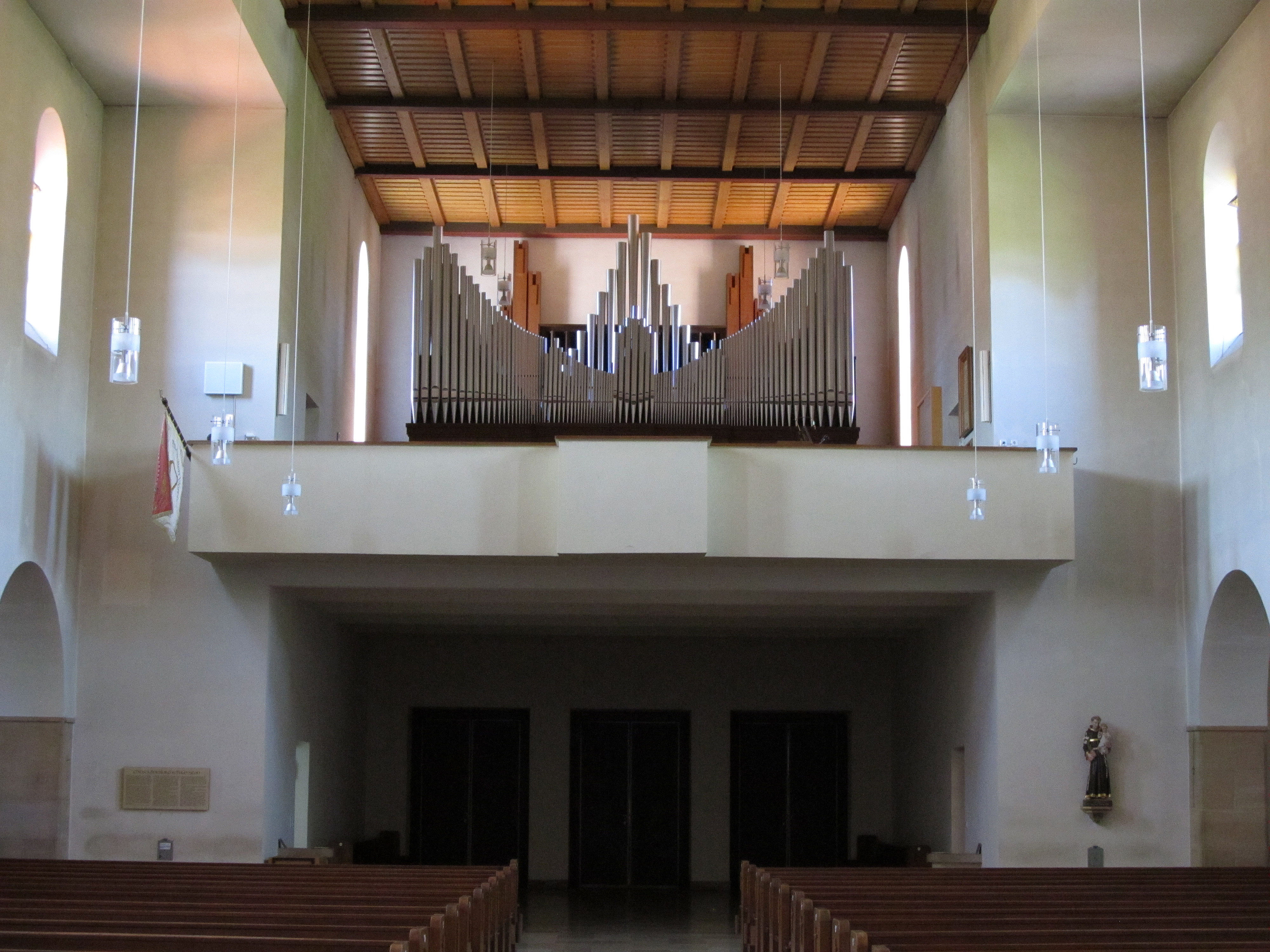 Orgelempore der katholischen Pfarrkirche Christkönig in Hauenstein, Kreis Südwestpfalz, Rheinland-Pfalz